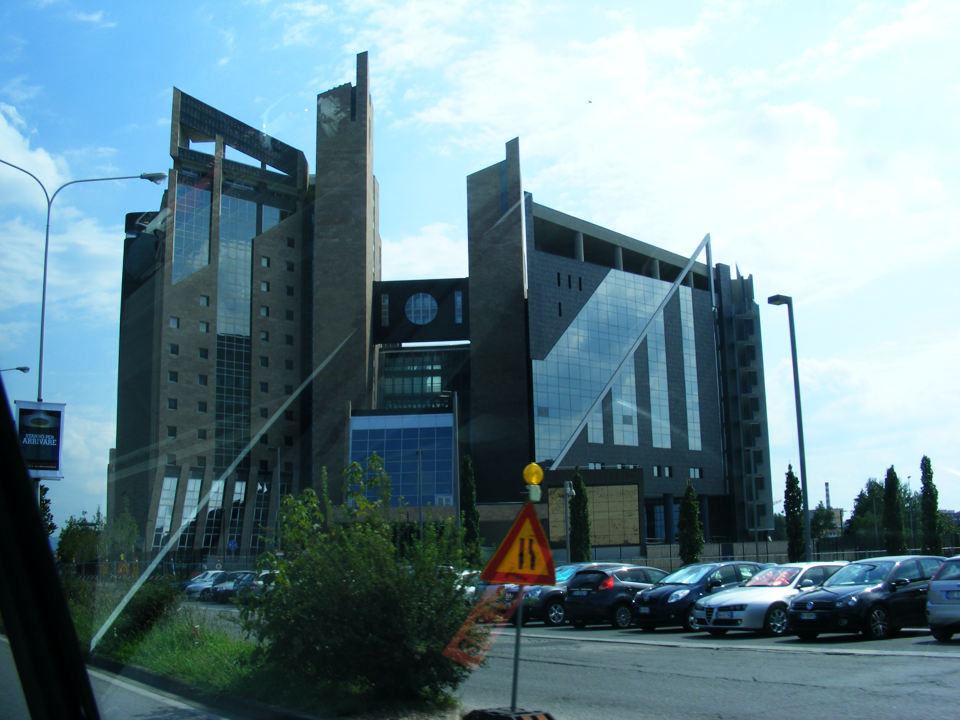 Firenze - Nuovo Palazzo Di Giustizia